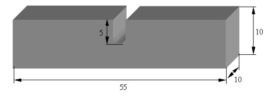 Eprouvette Charpy normalisée Auteur : Taveneaux 2 février 2006 à 22:07 (CET)